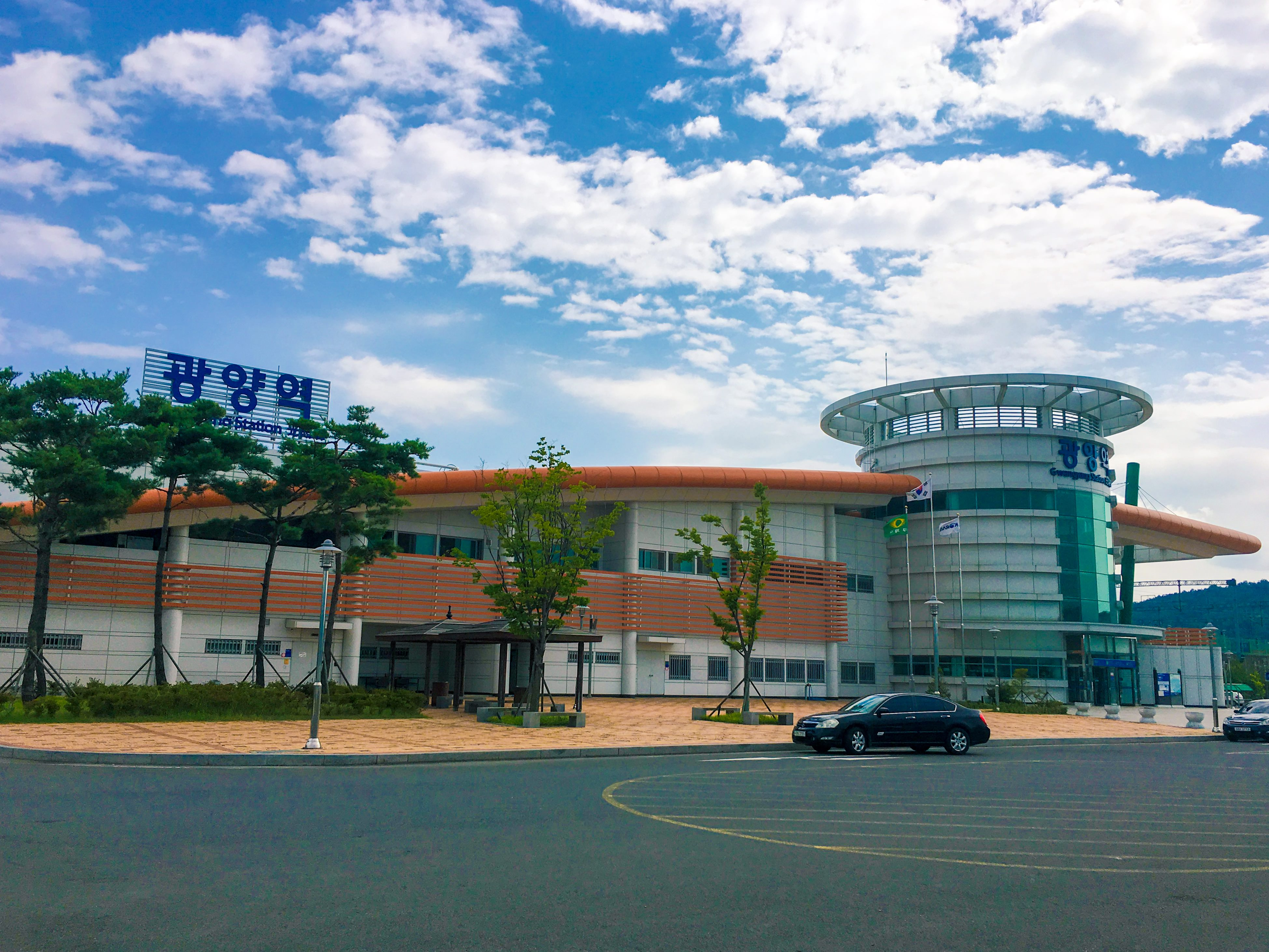 광양역 역사